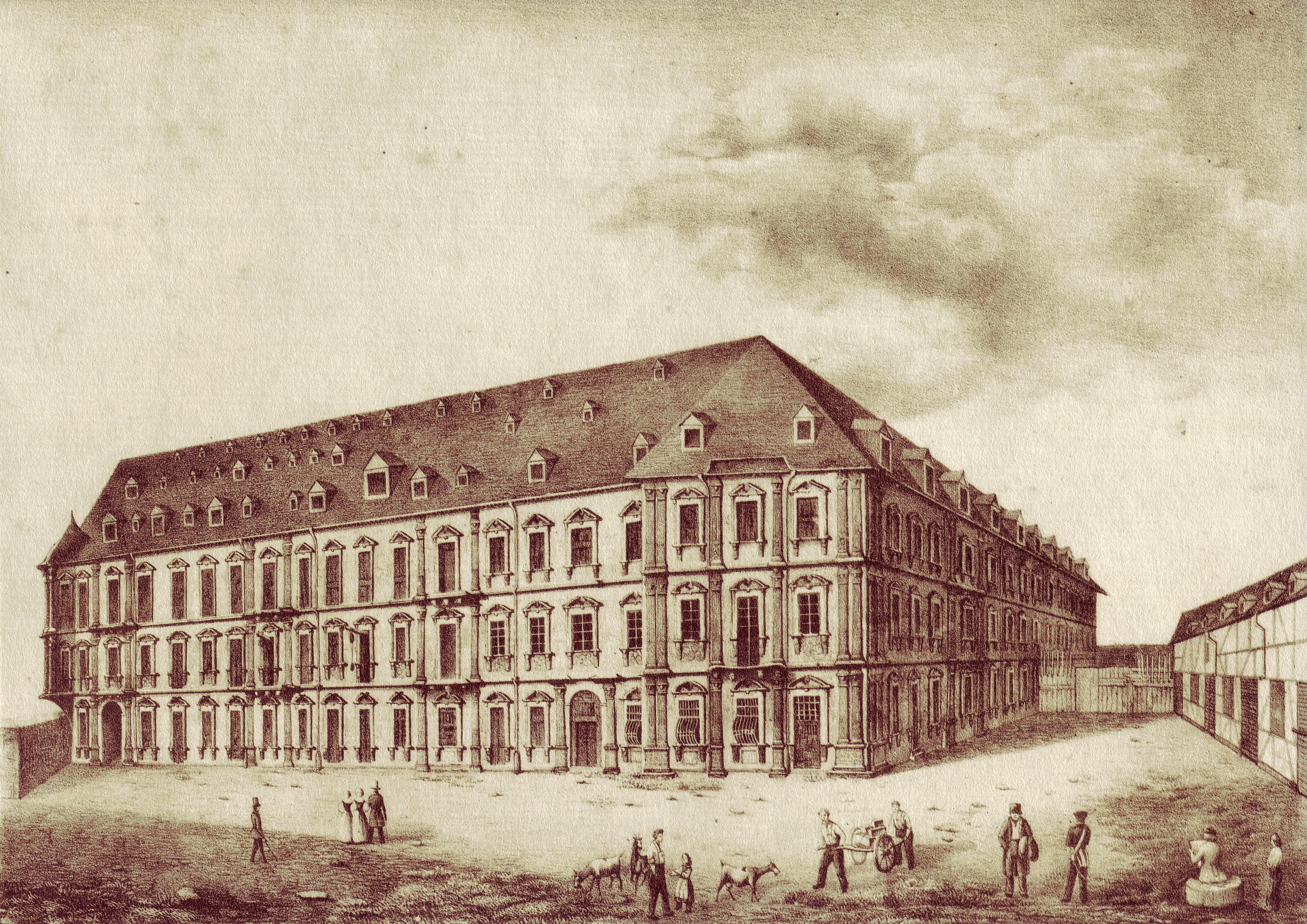 [Originalbeschreibung] Churfürst Georg Friedrich von Greifenklau fing im Jahre 1627 an das ehemalige churfürstliche Residenzschloss zu erbauen. Der 30 Jährige Krieg hinderte jedoch die Fortführung des Baues bis zu den Jahren 1675 und 1678 wo es von dem Churfürsten Hardart von der Leyen vollendet wurde. Den neuen Flügel des Schloßes erbaute Churfürst Johann Friedrich Carl von Ostein während der Jahre 1752 - 1757. Nach der Zerstörung des Schlosses 1793 wurde es im Jahre 1795 zu einem Militairhospital verwendet. Später schenkte es Kaiser Napoleon der Stadt zum Dienste des Handels. Das Schloss wurde nun zu Magazinen eingerichtet und gebraucht, mit einer grossen Mauer umgeben und mit dem Freihaven verbunden. Bei Gelegenheit der 20sten Versammlung deutscher Naturforscher im Jahr 1842 wurde der sogenannte neue Schloßbau in seinem Innern auf Kosten der Stadt neu hergestellt.